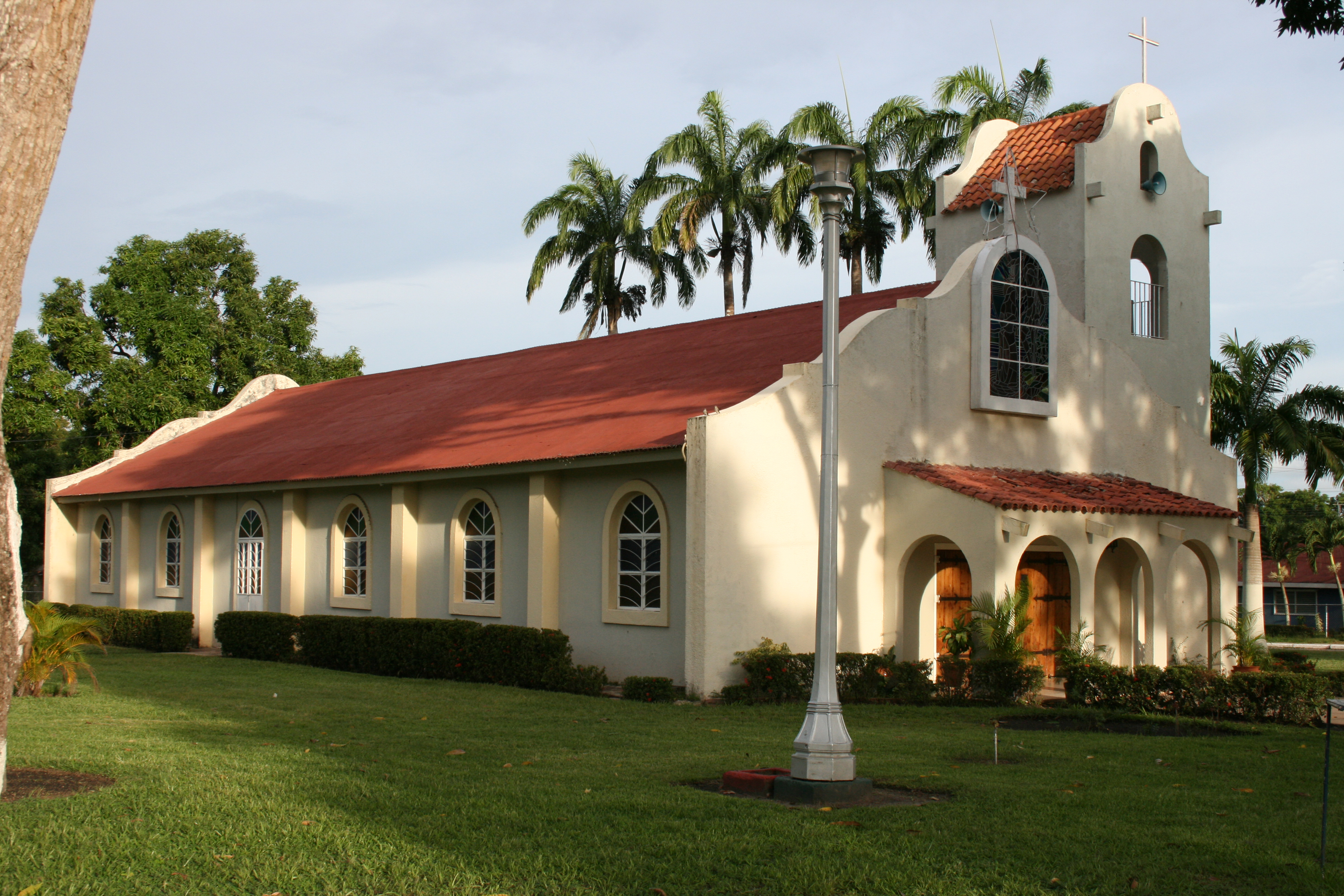 Data de 1950 donada por la Mene Grande Oil Company